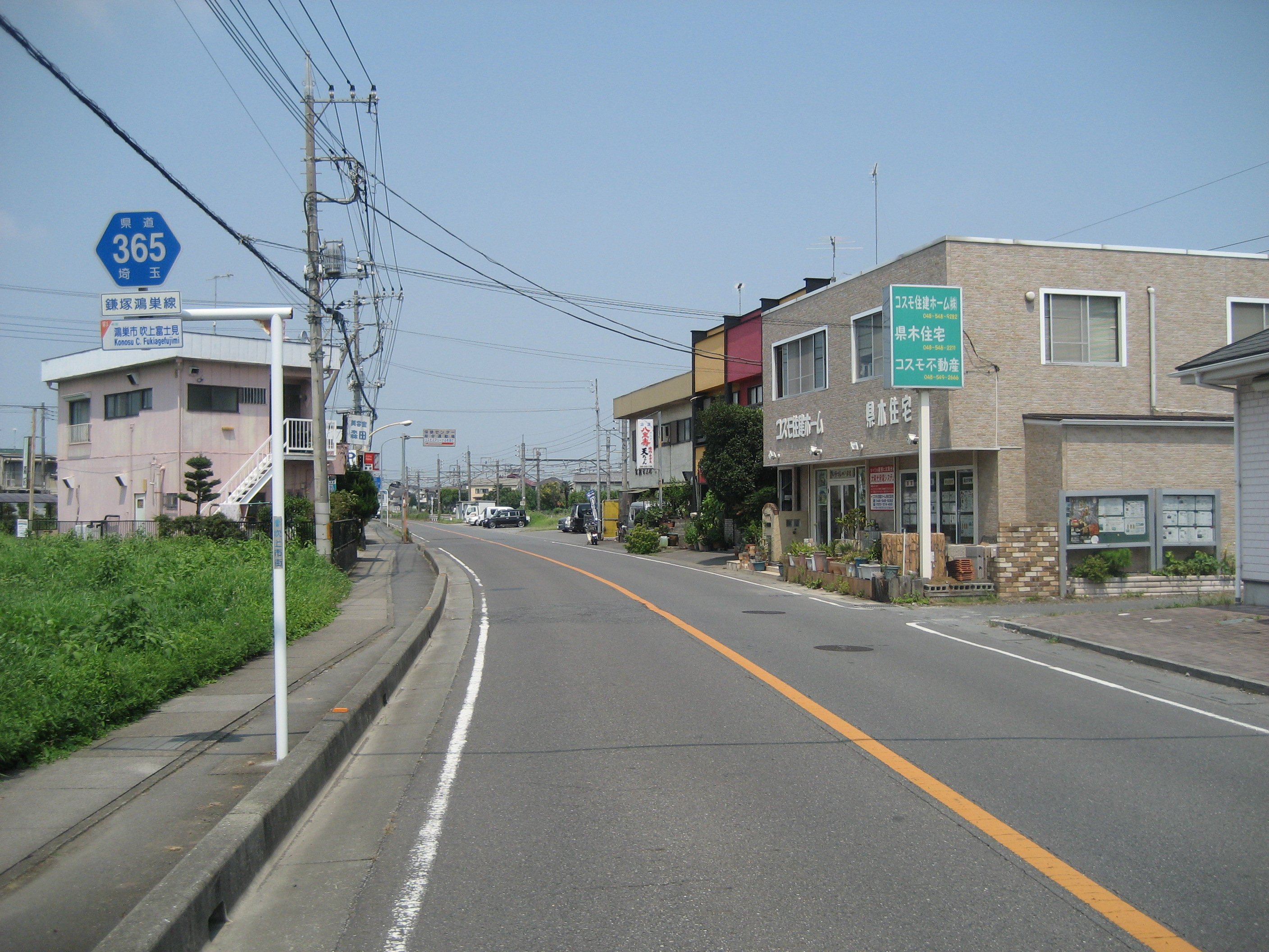 埼玉県道365号線鴻巣市吹上富士見付近